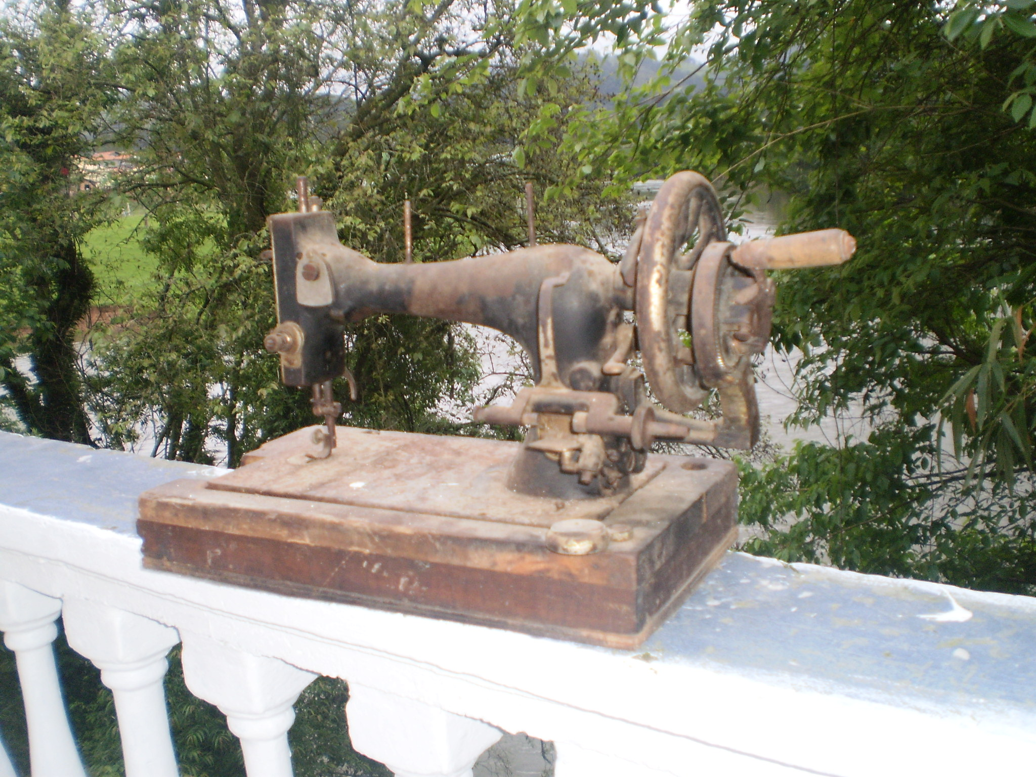 Máquina de costura Gritzner, de Anita Westphal Fraga